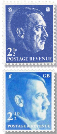 Fantasiemarke anlässlich des Erscheinens des Buchs von Len Deighton "SS-GB", 1978. Oben die Originalmarke aus dem beigelegten Markenheftchen, unten eine spätere Fälschung.